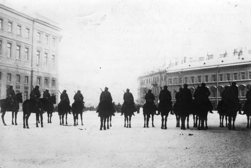 Zentralbild / Unruhen in St. Petersburg, Januar 1905. UBz.: der Urizky-Platz vor dem Winterpalast wird durch Militär abgesperrt 832-05 [Scherl Bilderdienst] Same photo in St. Petersburg state archive. То же самое фото в ЦГАКФД. 9 января 1905 г. Кавалеристы у Певческого моста задерживают движение шествия к Зимнему дворцу.